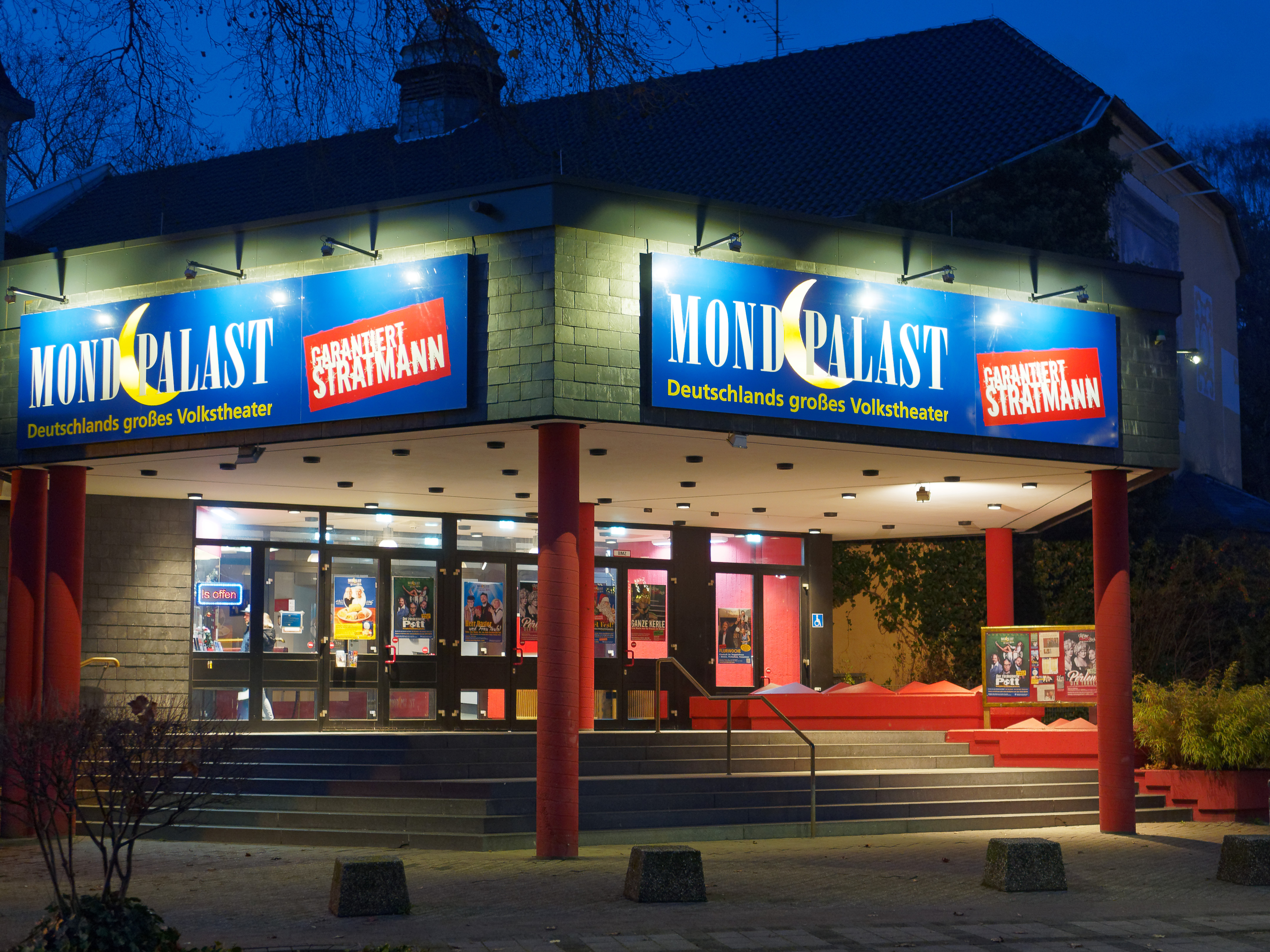 Eingangsbereich des Ruhrgebietstheaters Mondpalast im Herner Stadtteil Wanne, Wilhelmstraße 26